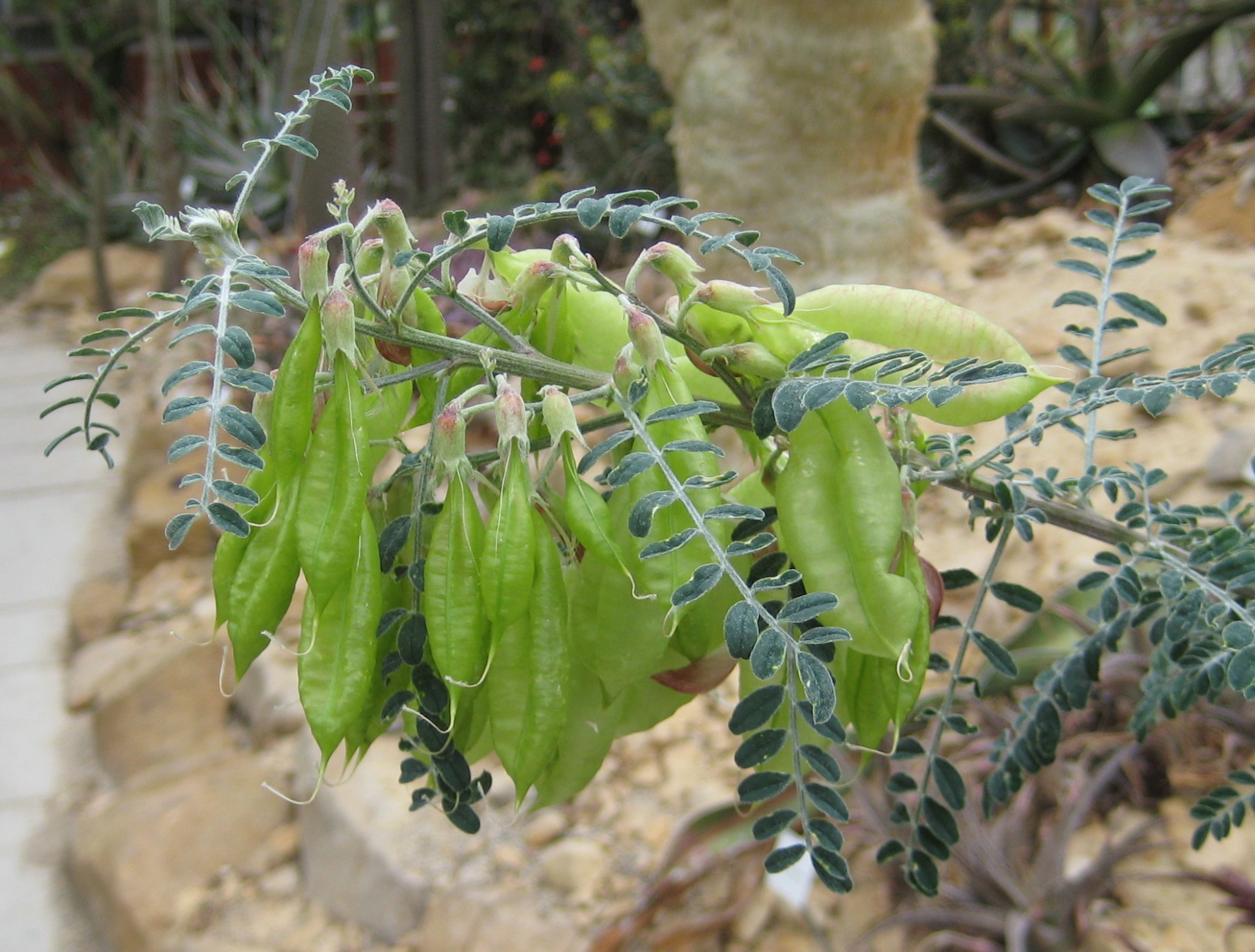 Sutherlandia frutescens im Botanischen Garten Dresden